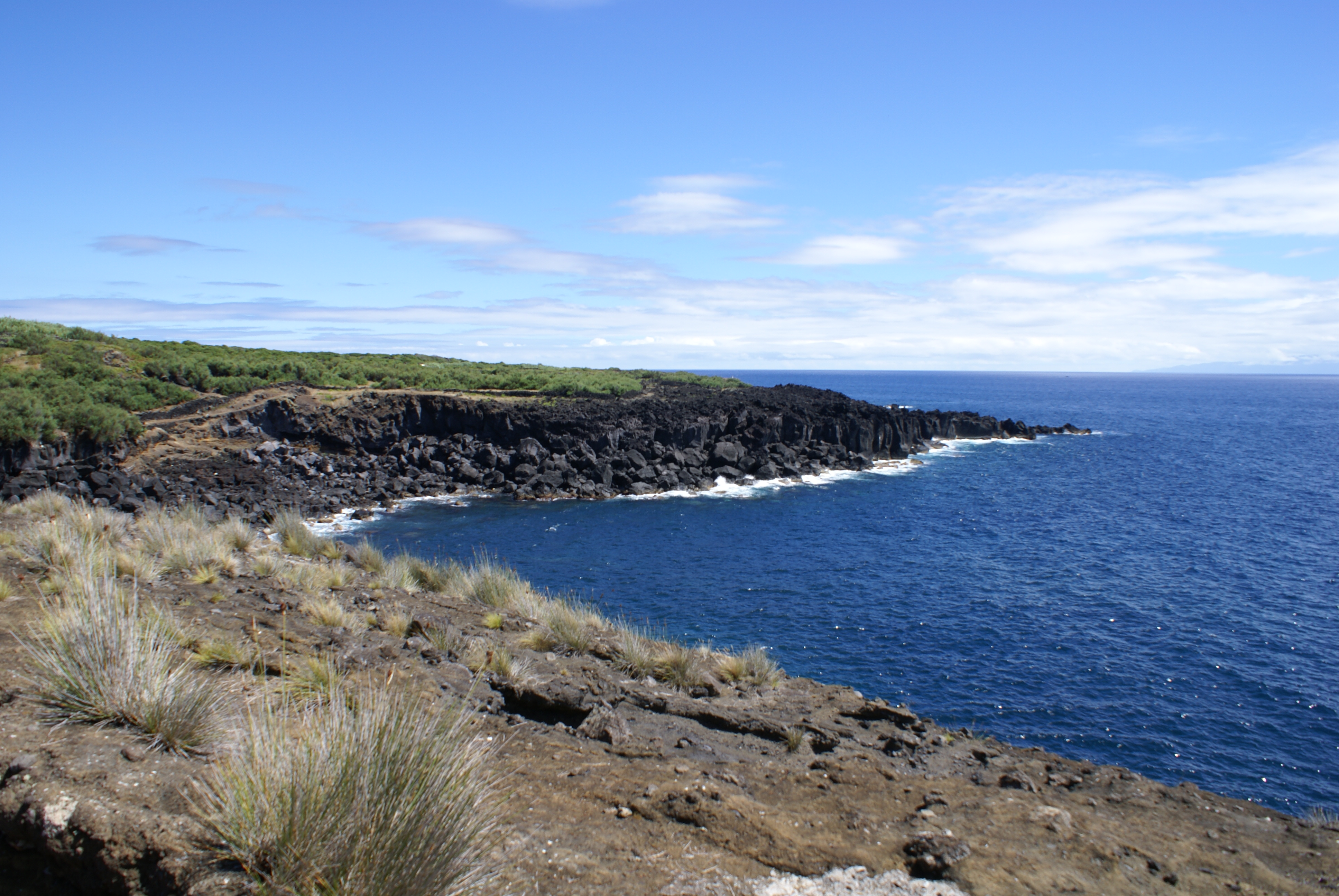 Baía da Folga, vista parcial, Santa Cruz da Graciosa, ilha Graciosa, Açores, Portugal